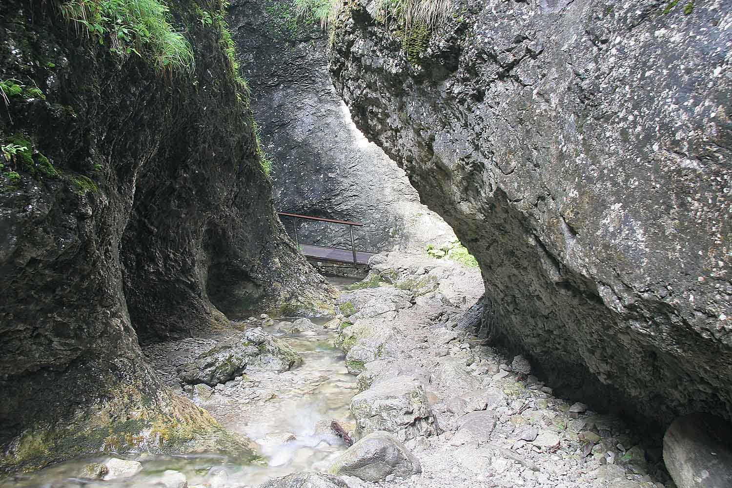 Horné diery, Malá Fatra, district Žilina, Slovakia autor:Prazak date: 30. 6. 2006